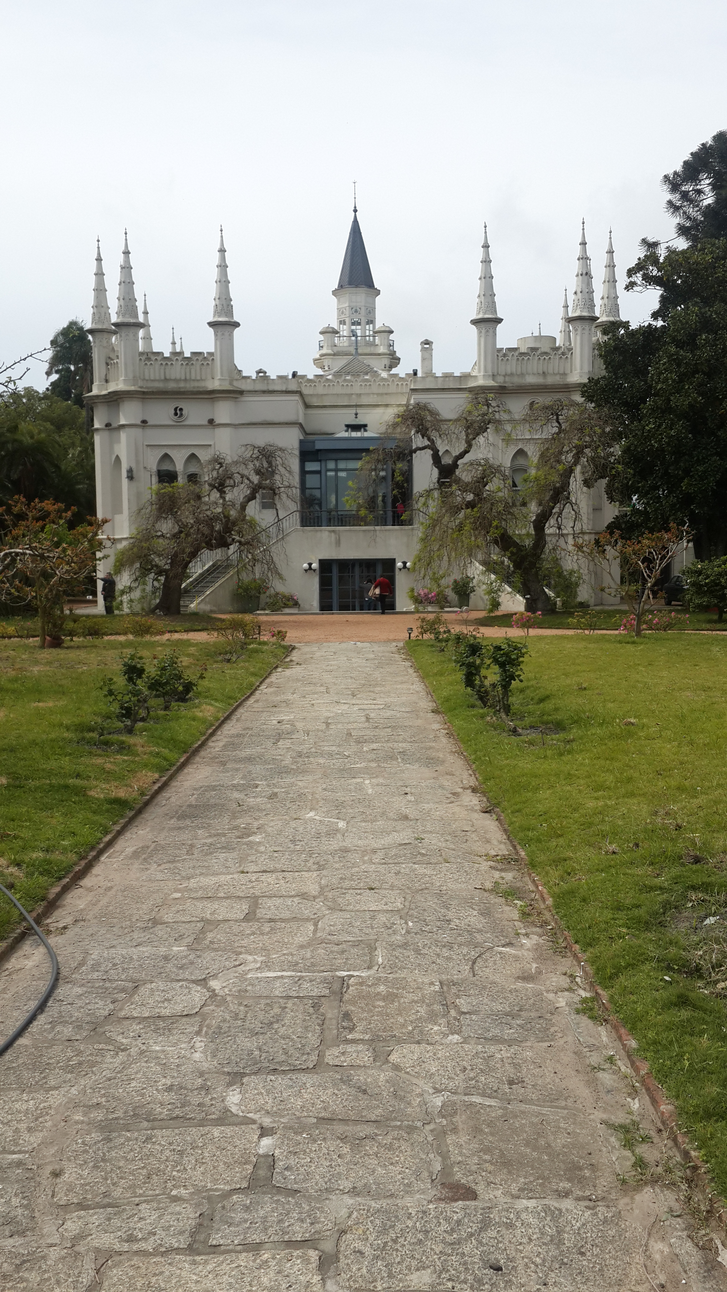 Vista trasera de la casa quinta de Moon.